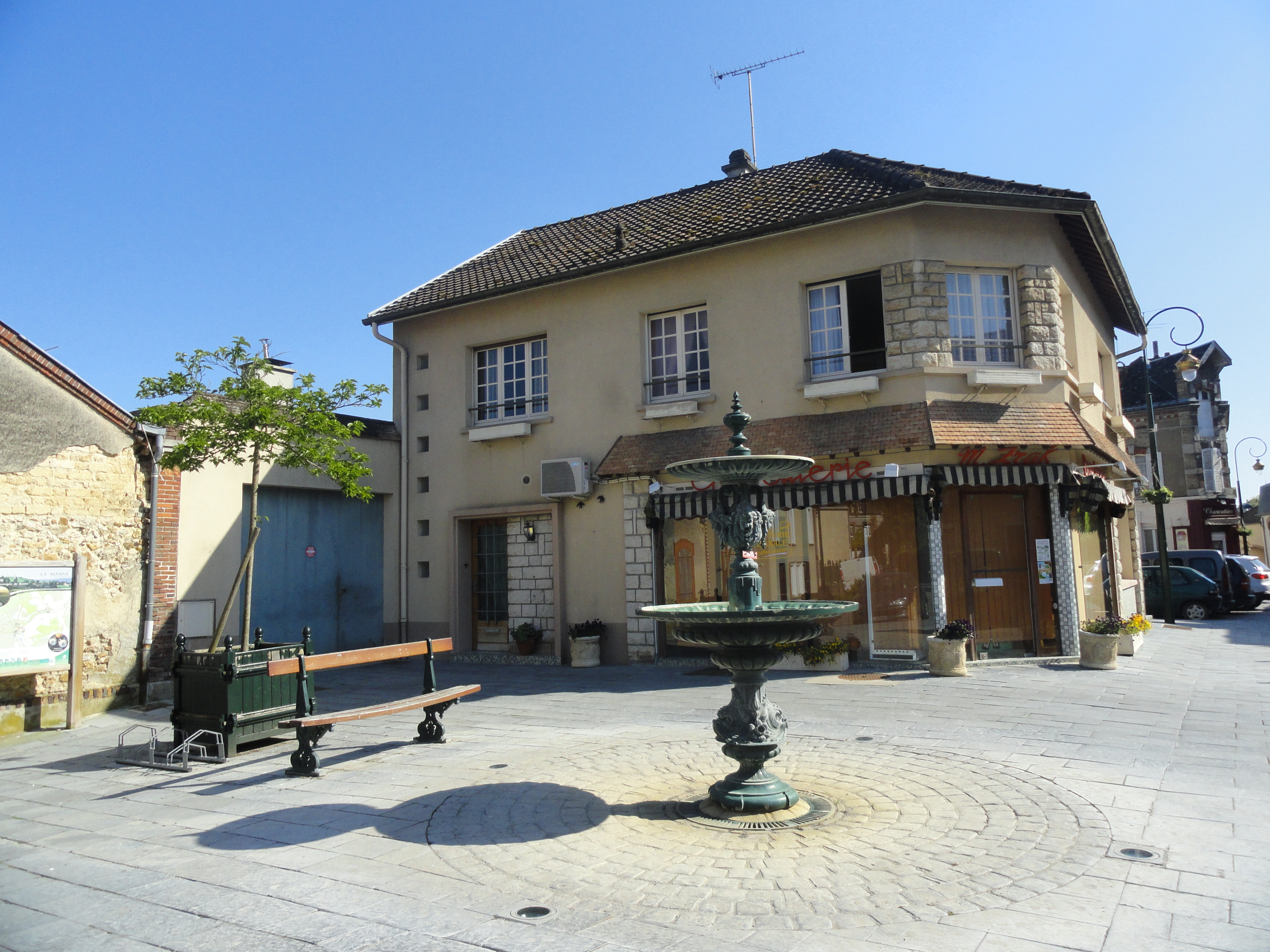 La Place Carnot et sa fontaine au centre d'Avenay-Val-d'Or (Marne, France).